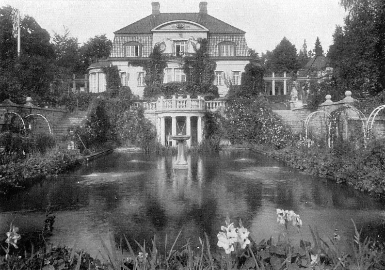 Villa med damm och trädgårdsanläggning, kallad Slottet på Storholmen norr om Lidingö inom Vaholms kommun, uppförd av bankir Gunnar Kassman omkring 1917-1918. Arkitekter Östlihn & Stark